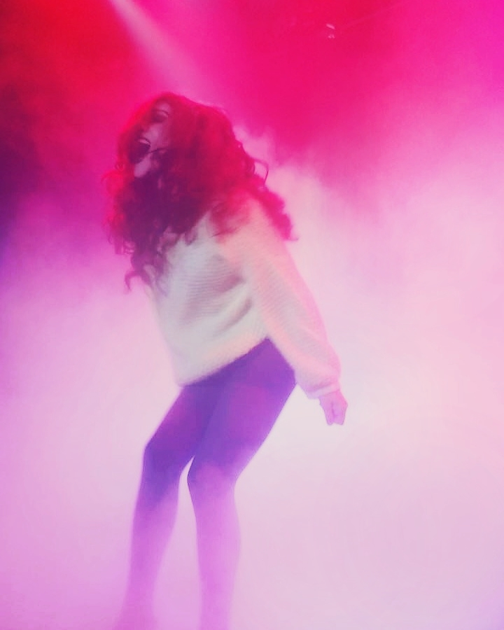 La drag queen Silver Catalano au Cabaret Le Drague de Québec en 2016.